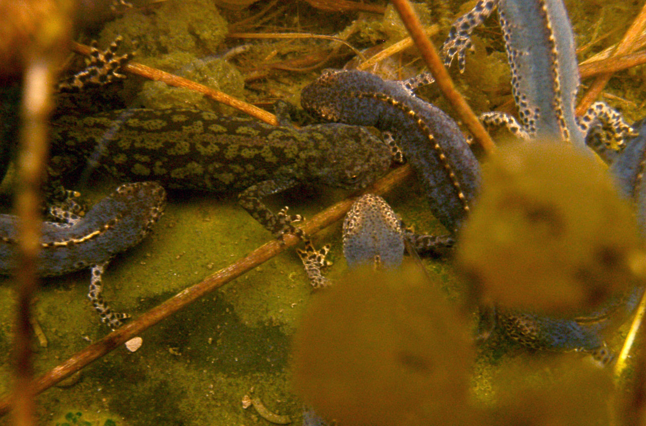 Bergmolche in der Paarungszeit: ca. fünf Männchen (blau) und ein Weibchen (grün-braun)